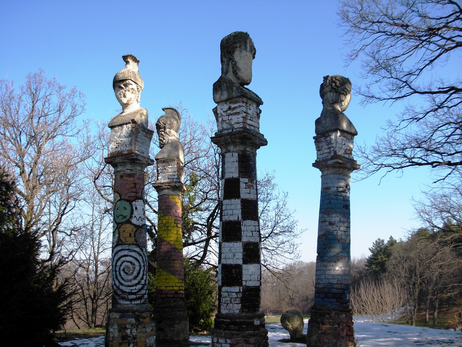 Ostaci skulpture "Pet glava" na Brežuljku ruža u Kameničkom parku.